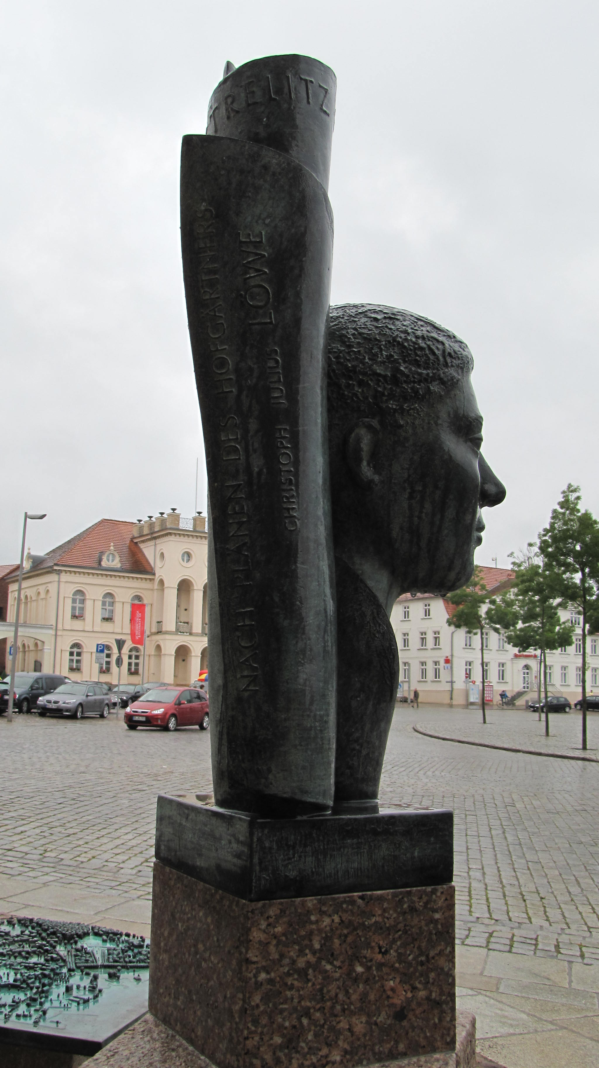 Stadtmodell mit Denkmal für Christoph Julius Löwe, 2010 geschaffen von Wolfgang Friedrich